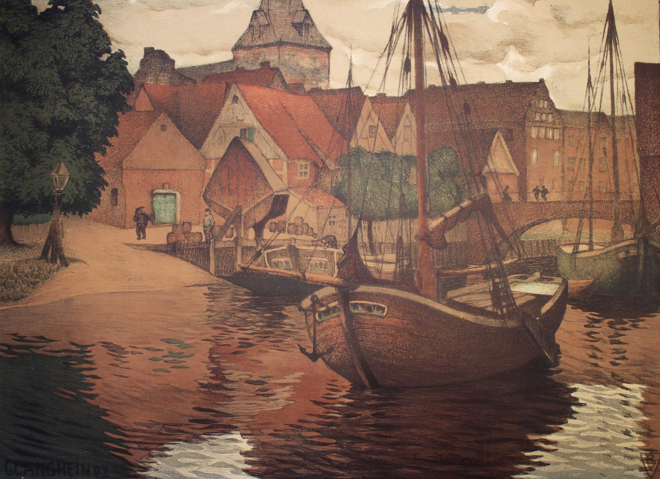 Ewer auf der Medem in Otterndorf. Im Hintergrund die Brücke der Cuxhavener Straße. Farblithografie. Druck nach einem Gemälde von 1902